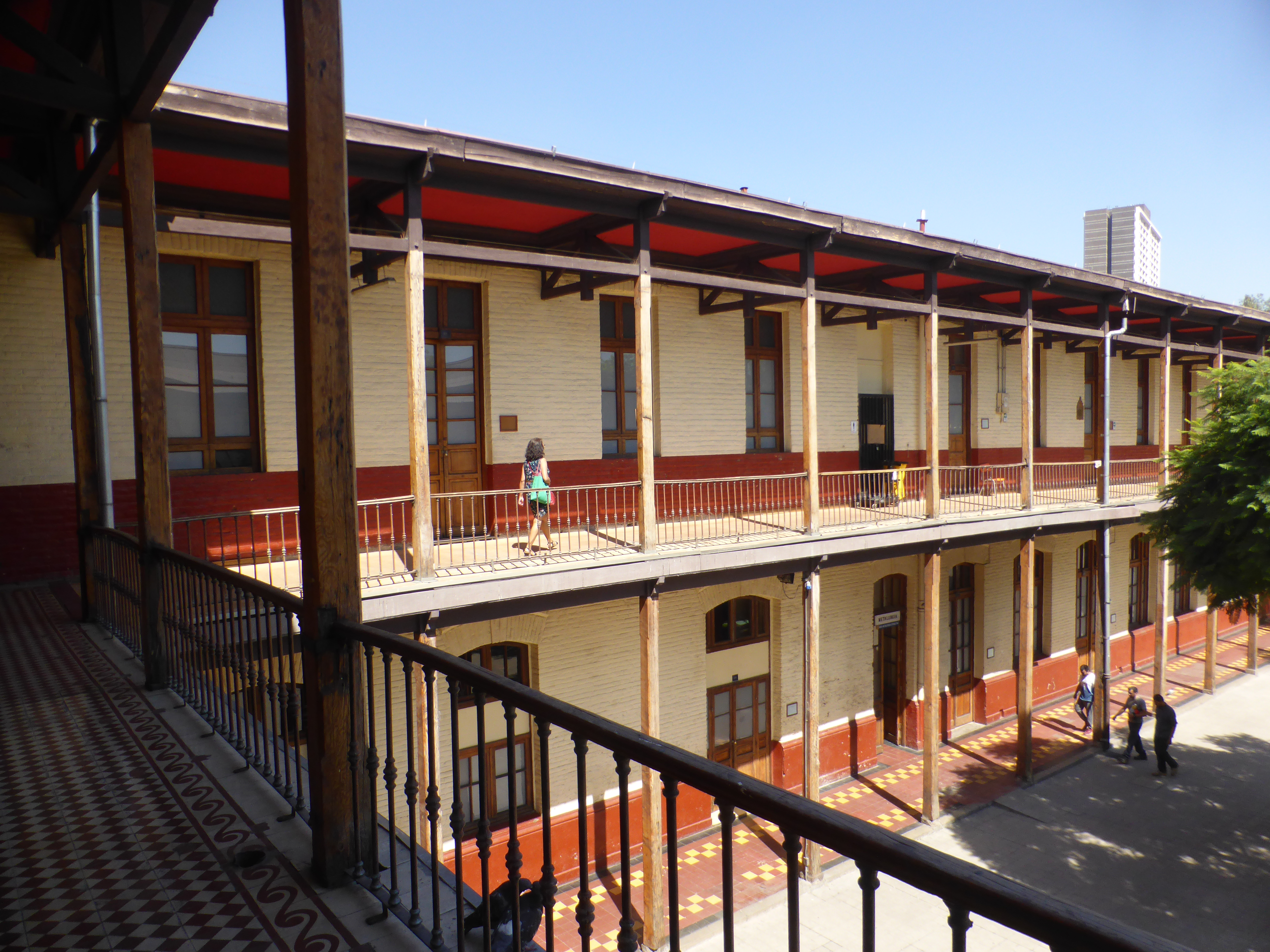 Uno de los patios de la Escuela de Artes y Oficios (EAO), de la Universidad de Santiago de Chile (ex-UTE, Universidad Técnica del Estado). Se fundó, en el siglo XIX, como Escuela de Artes y Oficios.